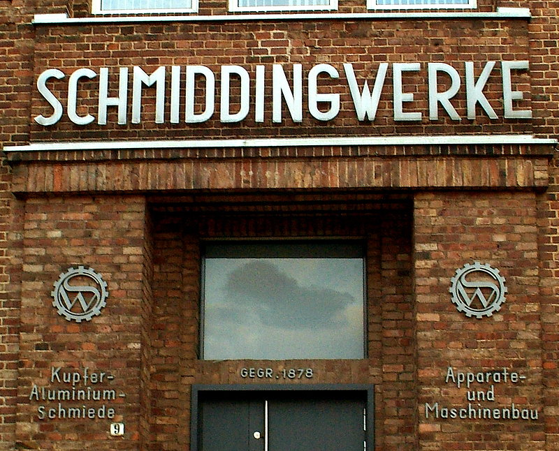 Am Eingang der Göttinger Chaussee 9 in Hannover-Ricklingen sind die montierten Schriftzüge der 1878 gegründeten ehemaligen Schmiddingwerke, Kupfer-Aluminium-Schmiede und Apparate- und Maschinenbau, erhalten.